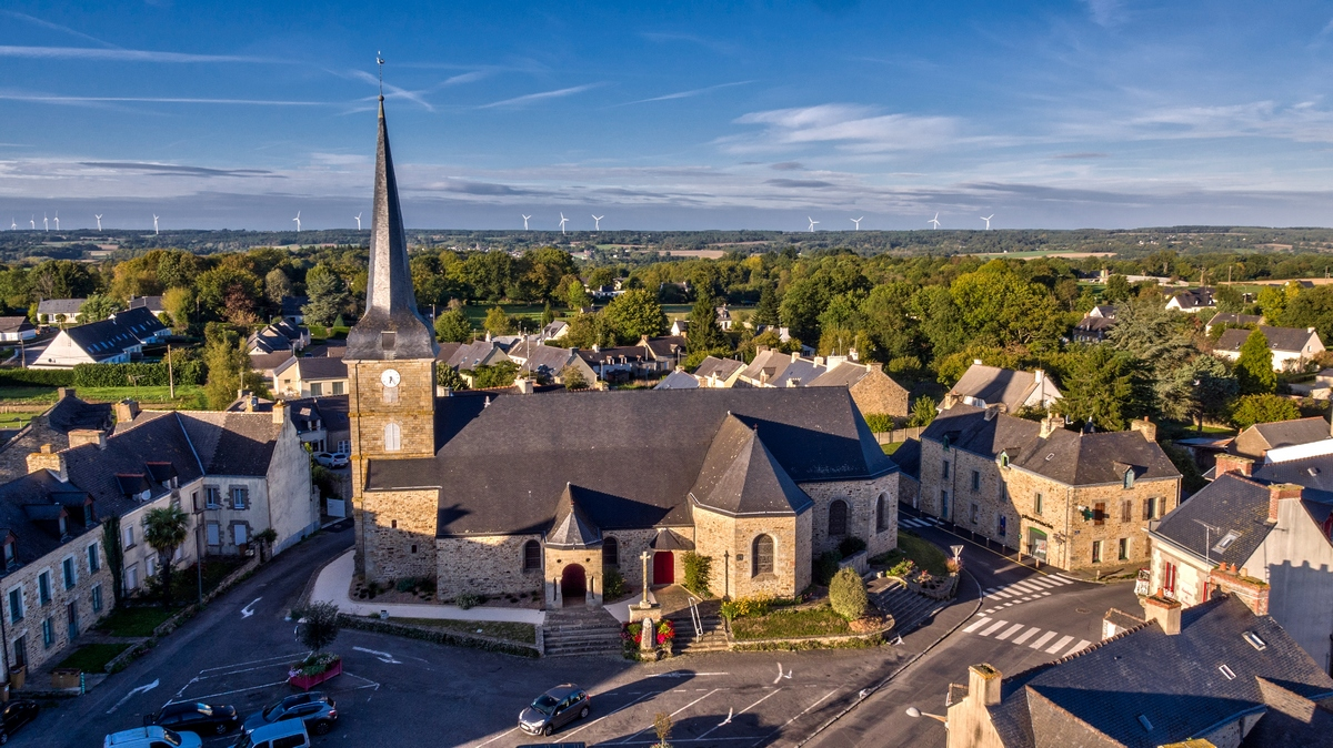 vue aérienne de la place de l'église